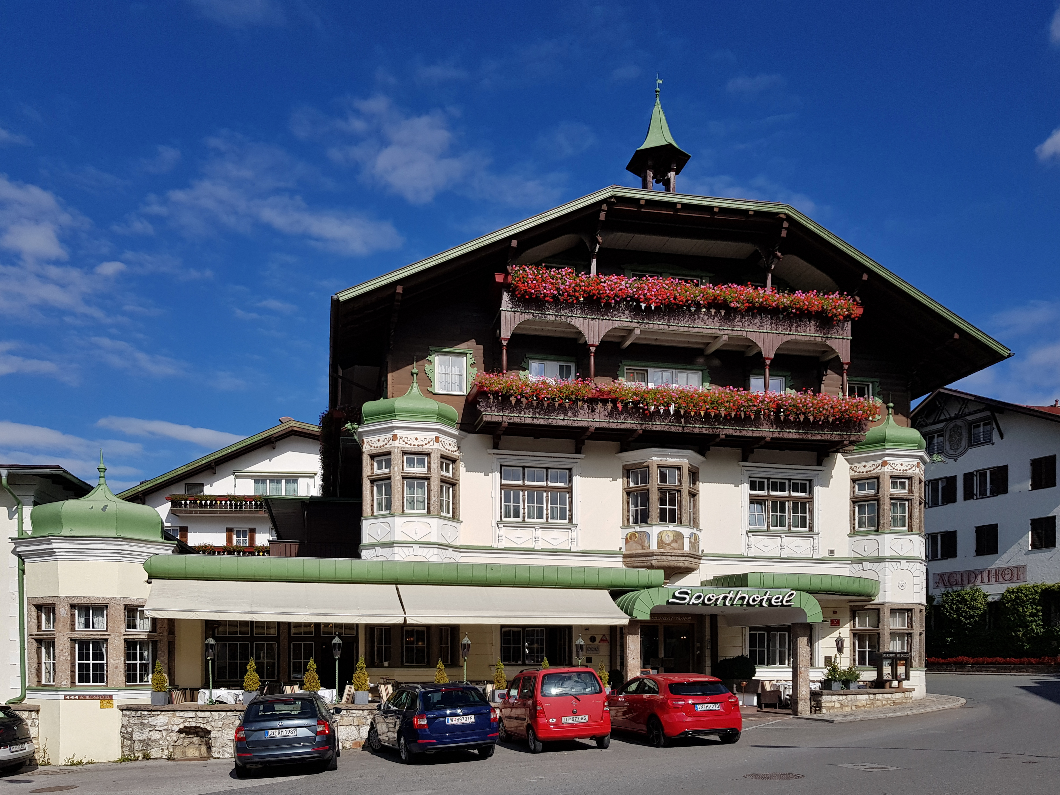 Hotel Altwirt, Sporthotel in der Hilberstraße 17 This media shows the remarkable cultural object in the Austrian state of Tyrol listed by the Tyrolean Art Cadastre with the ID 127877. (on tirisMaps, pdf, more images on Commons, Wikidata)